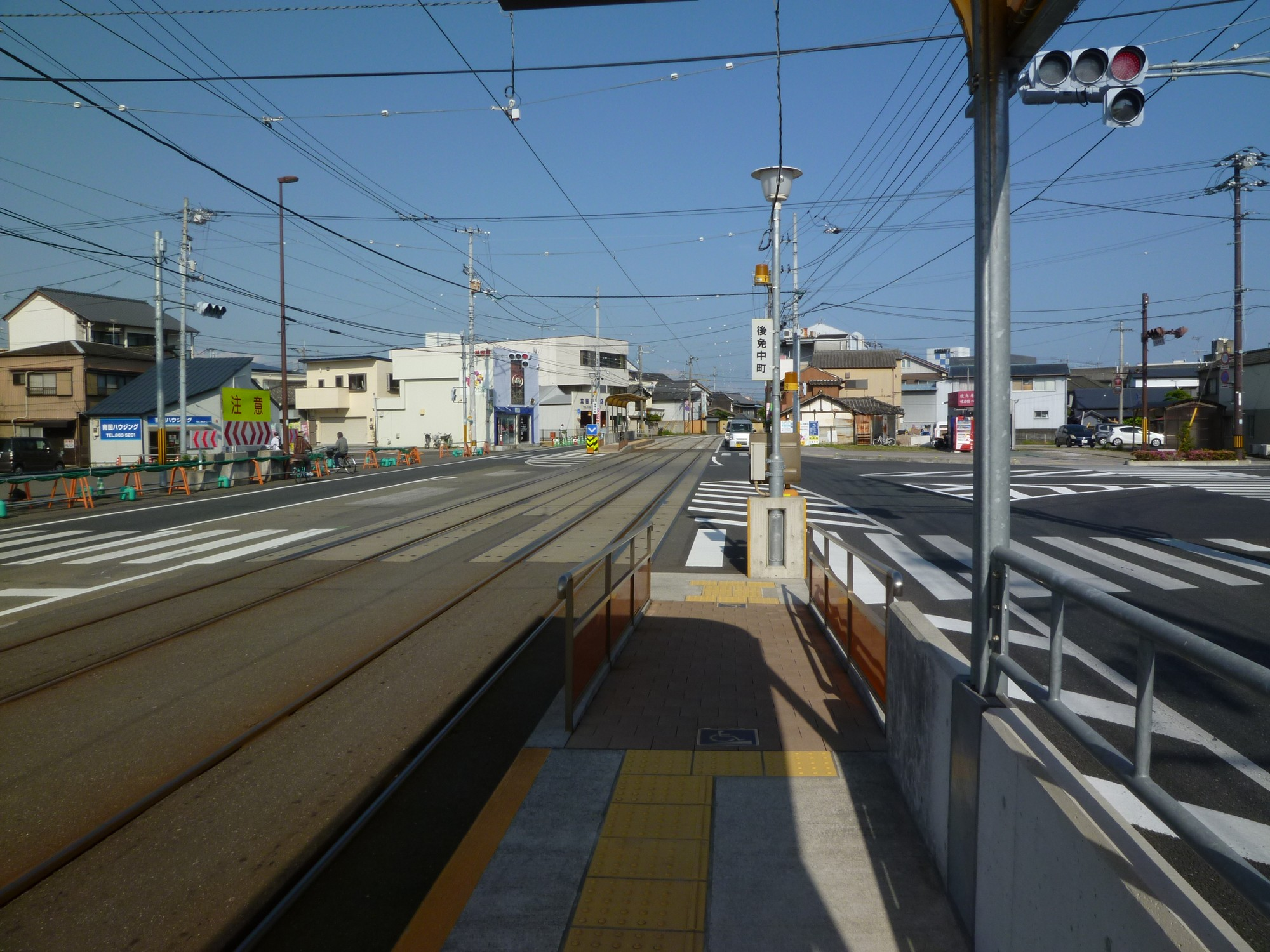 2015年5月8日撮影。